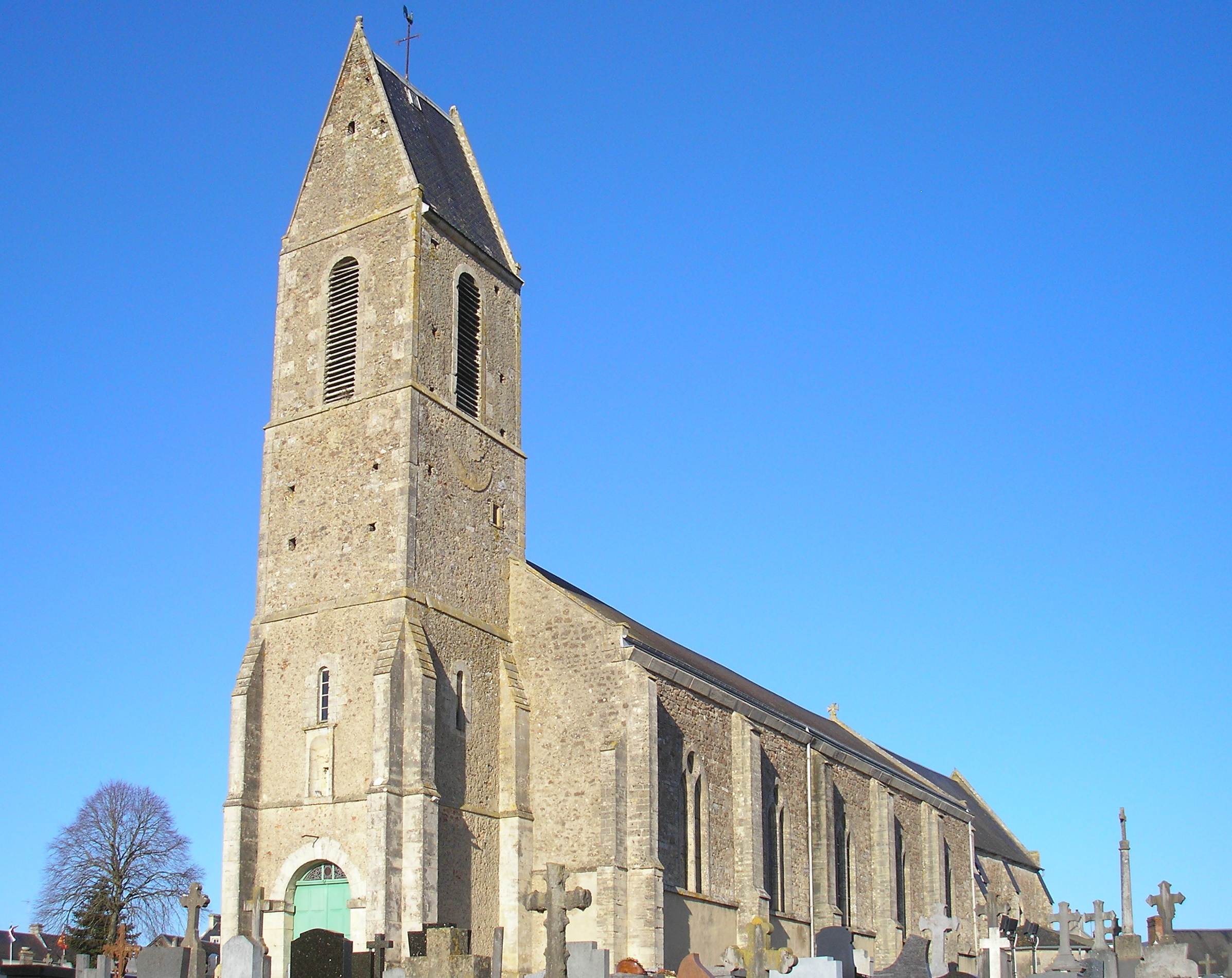 Neuilly-la-Forêt (Normandie, France). L'église Notre-Dame-de-l’Assomption.